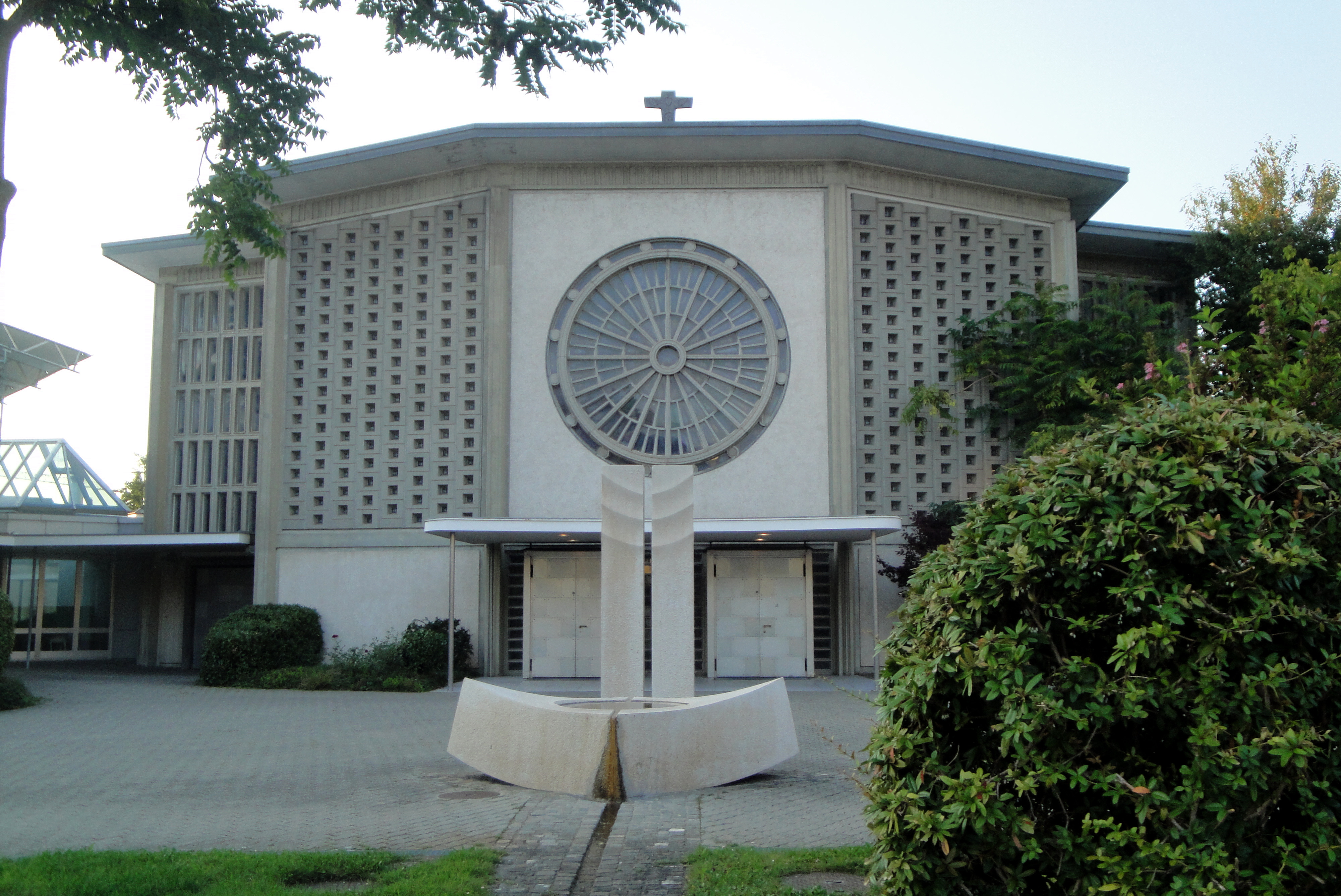 Bern, Katholische Kirche Bruder Klaus mit künstlerisch gestalteter Brunnenanlage Quelle des Lebens (Karl Imfeld 1989) im Vordergrund.